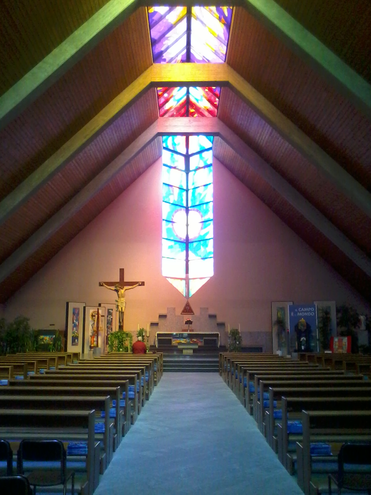 Interno della chiesa parrocchiale di Gaggiano (MI) - Italy